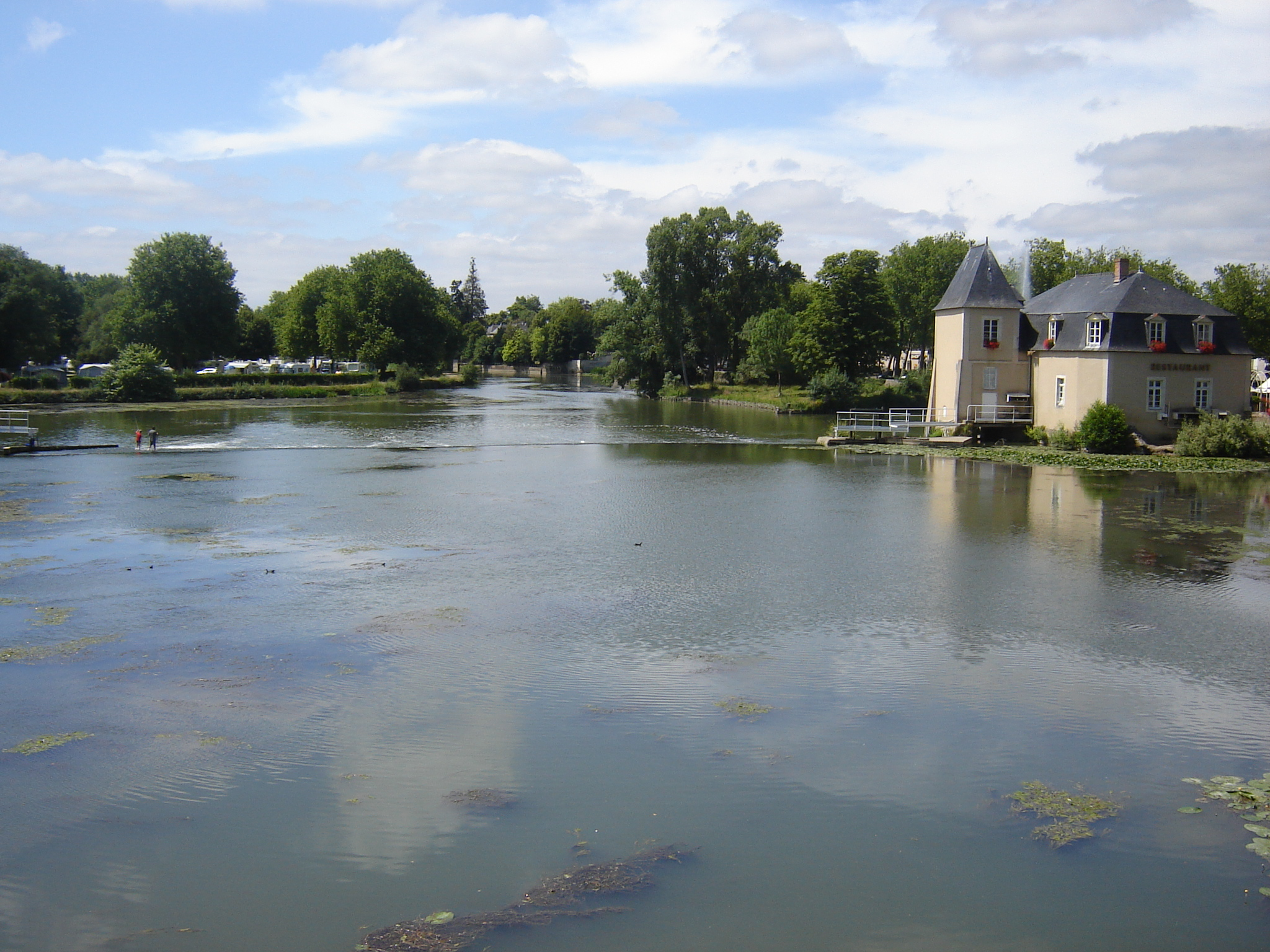 Vue sur le Loir du Pont en face de la Mairie